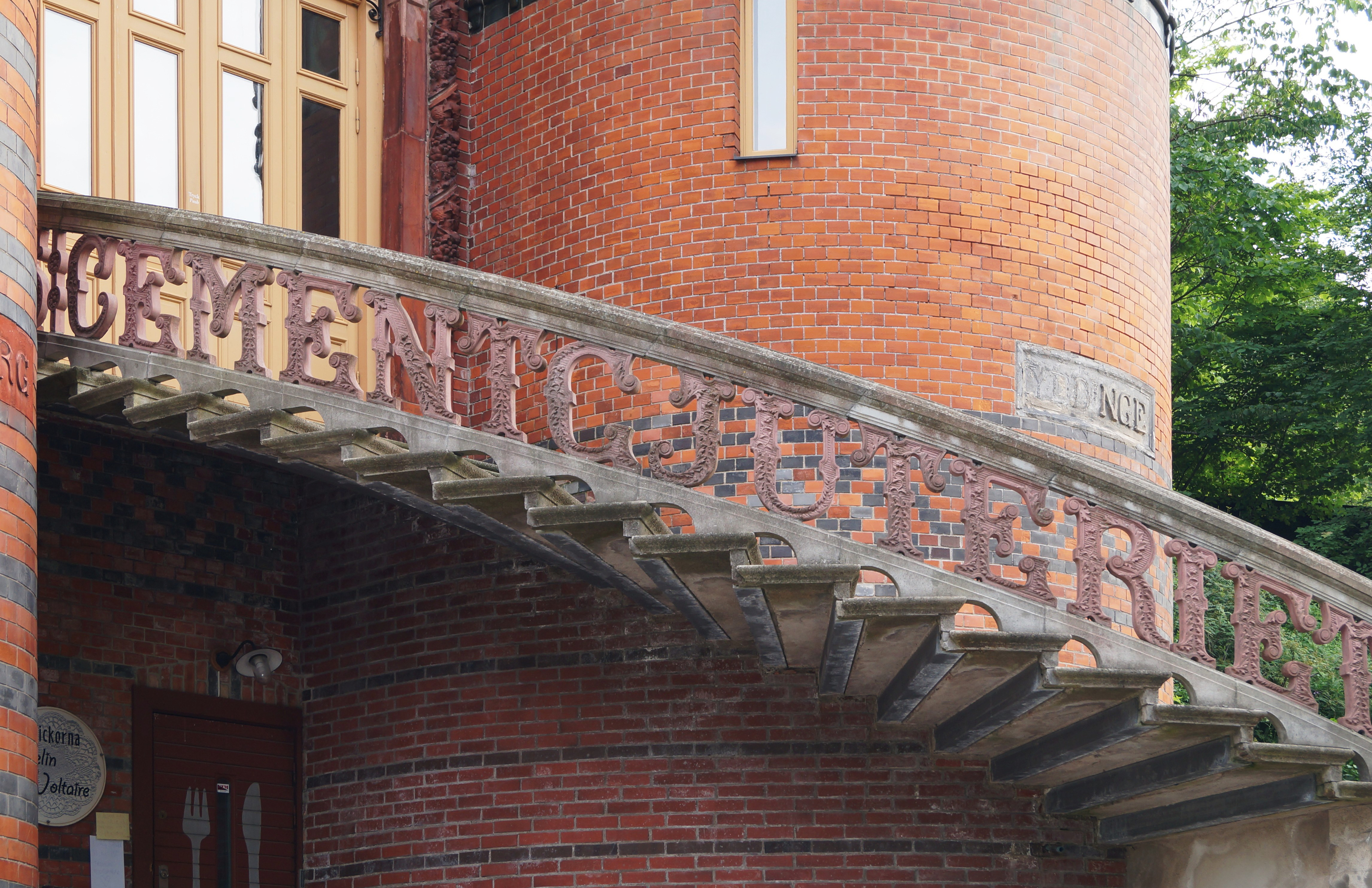 Skånska gruvan på Rosendalsvägen 14, 2013. "CEMENTGJUTERIET" i räcket